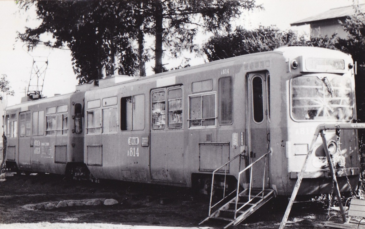 円山公園そばの宮の森交番横広場で保存されていたA813+A814（1980.9.18撮影）